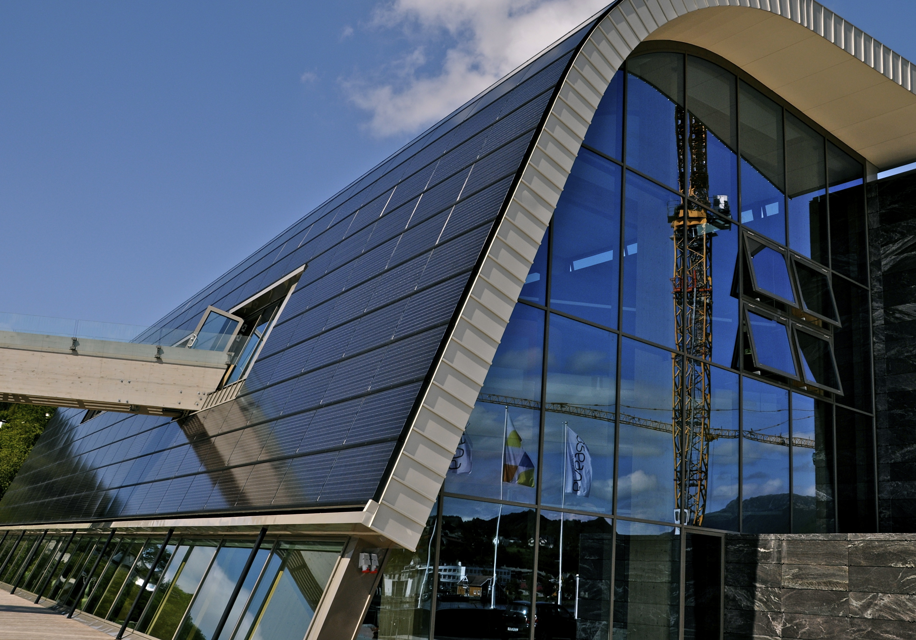 Oseana kunst- og kultursenter i Os, Hordaland